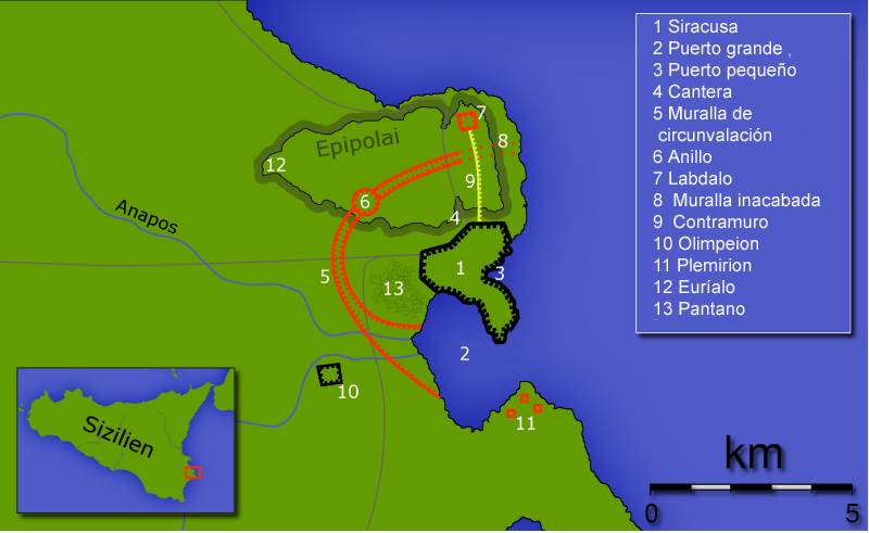 Mapa del asedio de Siracusa por los atenienses en 414 a. C.